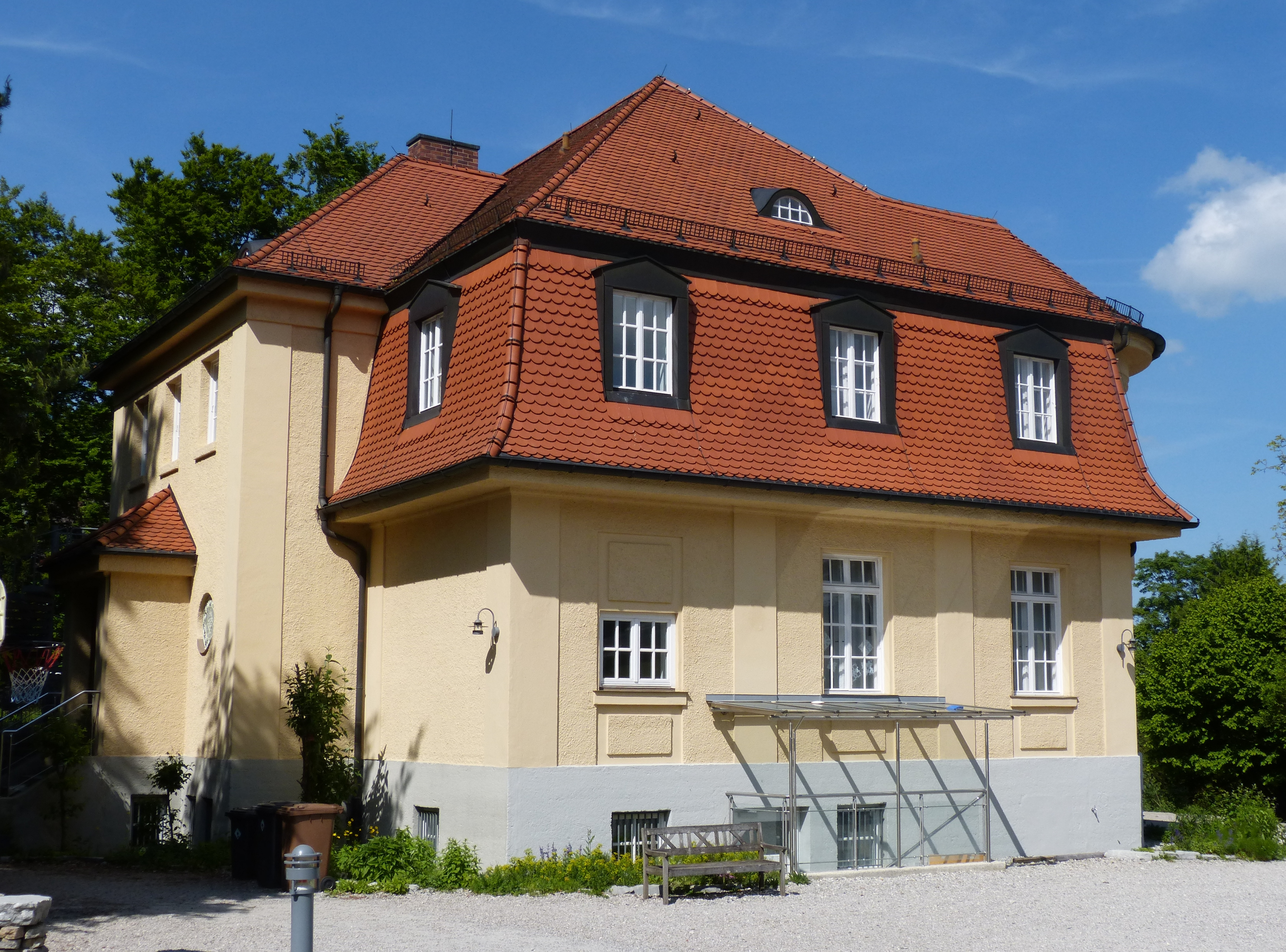 Feldafing, Höhenbergstraße 11. Die Villa Bernheimer, heute eine Grundschule der Gemeinde Feldafing, ist ein erdgeschossiger Mansarddachbau, der 1912/13 im neuklassizistischen Stil erbaut wurde. Bauherr der Villa war Otto Bernheimer, ein erfolgreicher Antiquitätenhändler aus München.